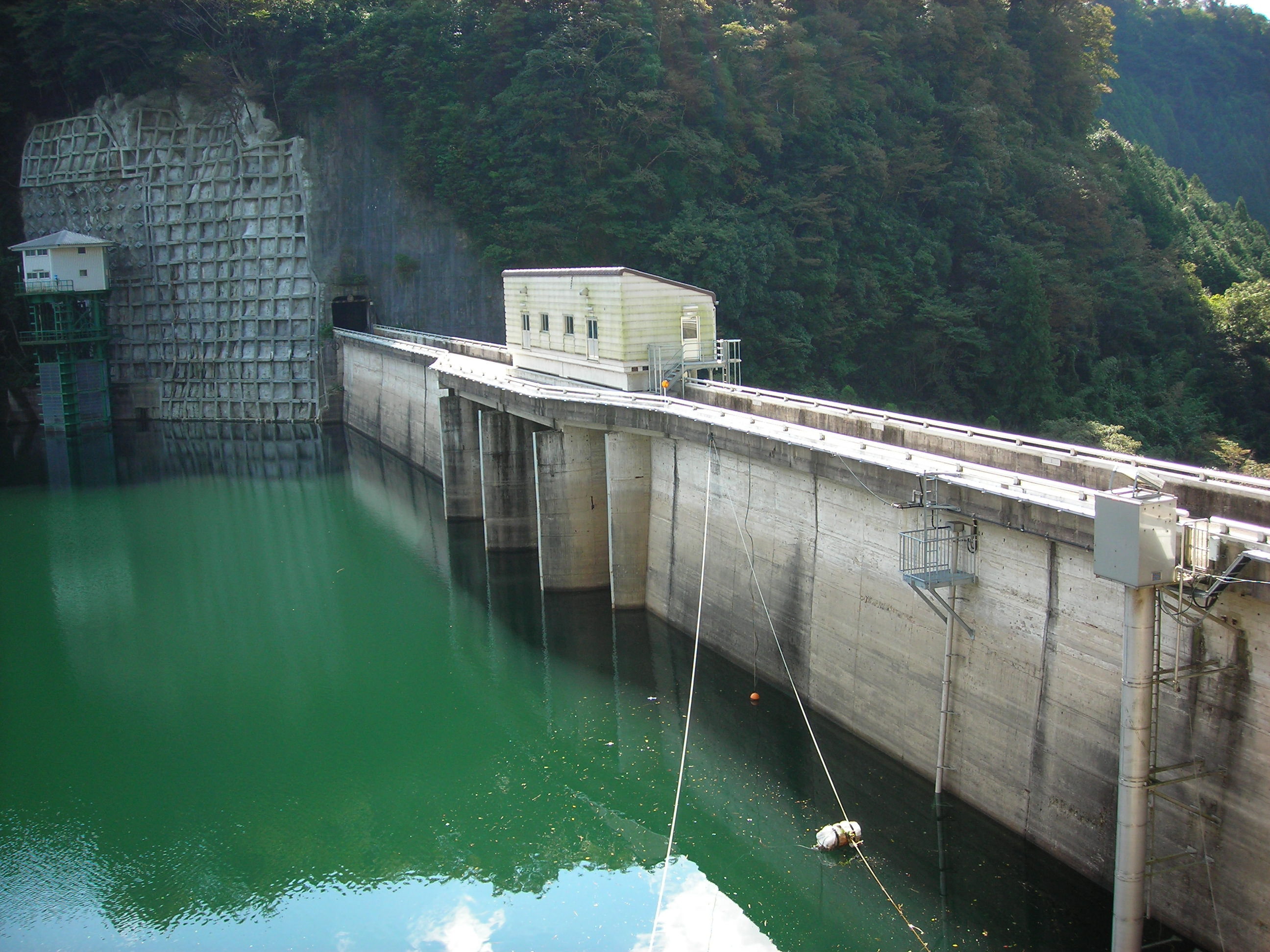 a photo image of Sabagawa Dam ,Yamaguchi, Japan.（山口県の佐波川ダムの写真映像です。）